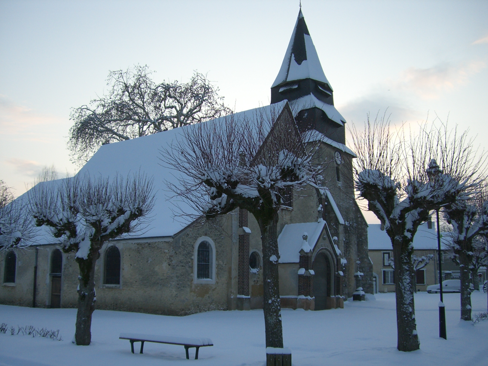 Eglise Saint Rémy